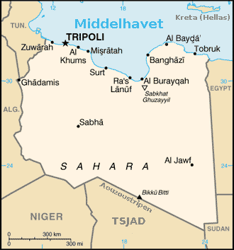 Kart over Libya